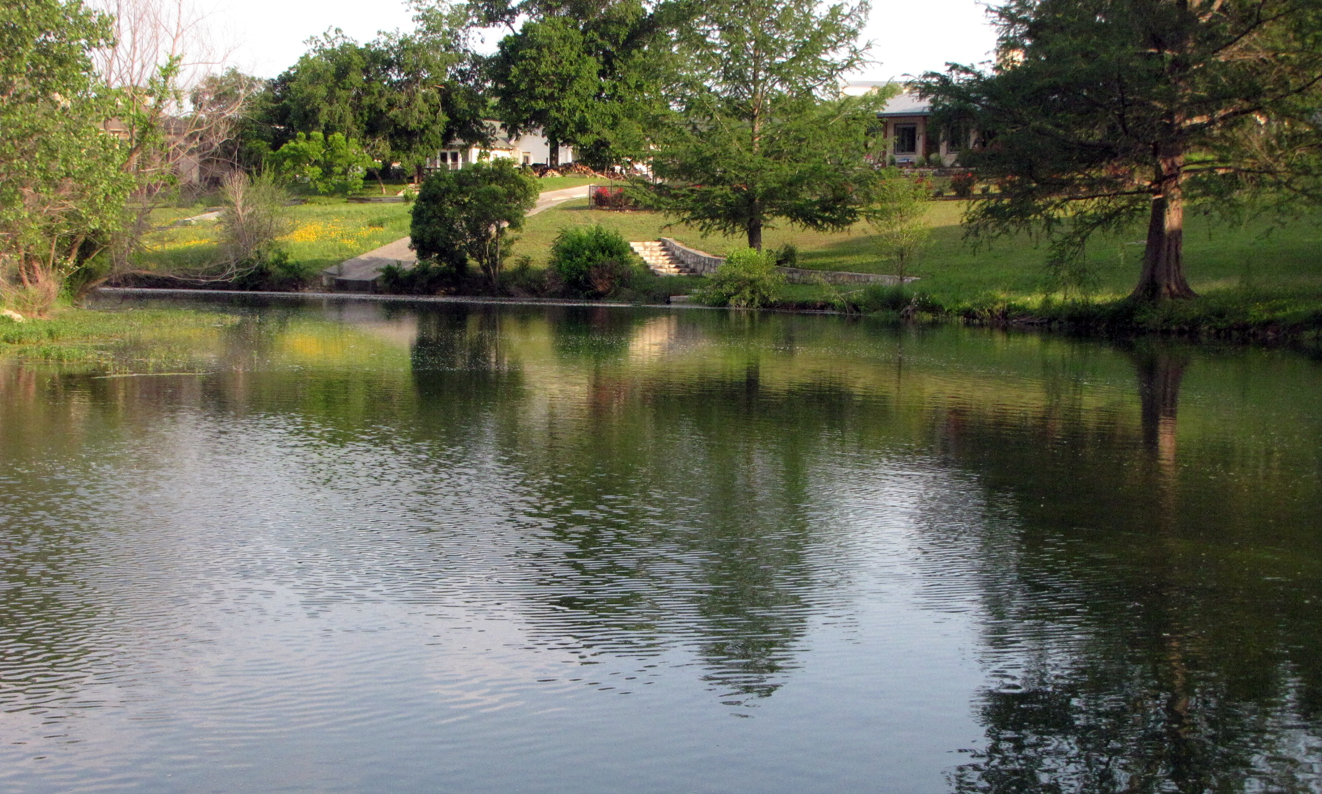 Taken APR 30, 2010 in Boerne, TX Cibolo Creek